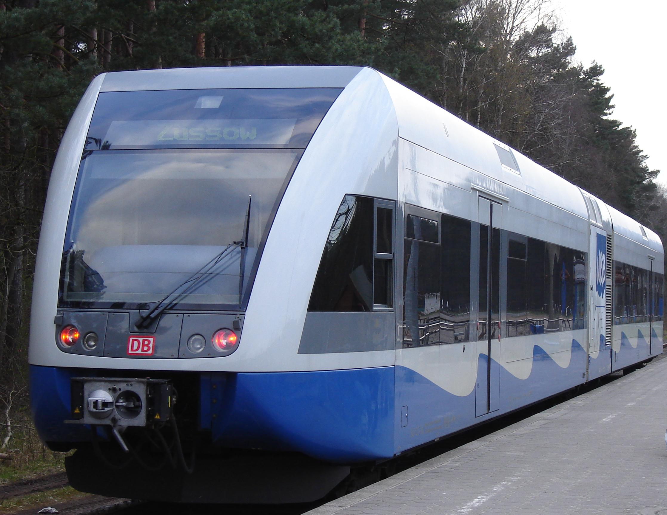 Niskopodłogowy, przegubowy wagon spalinowo-elektryczny serii GTW 2/6. Autor: H.Ciszewska-Czyż